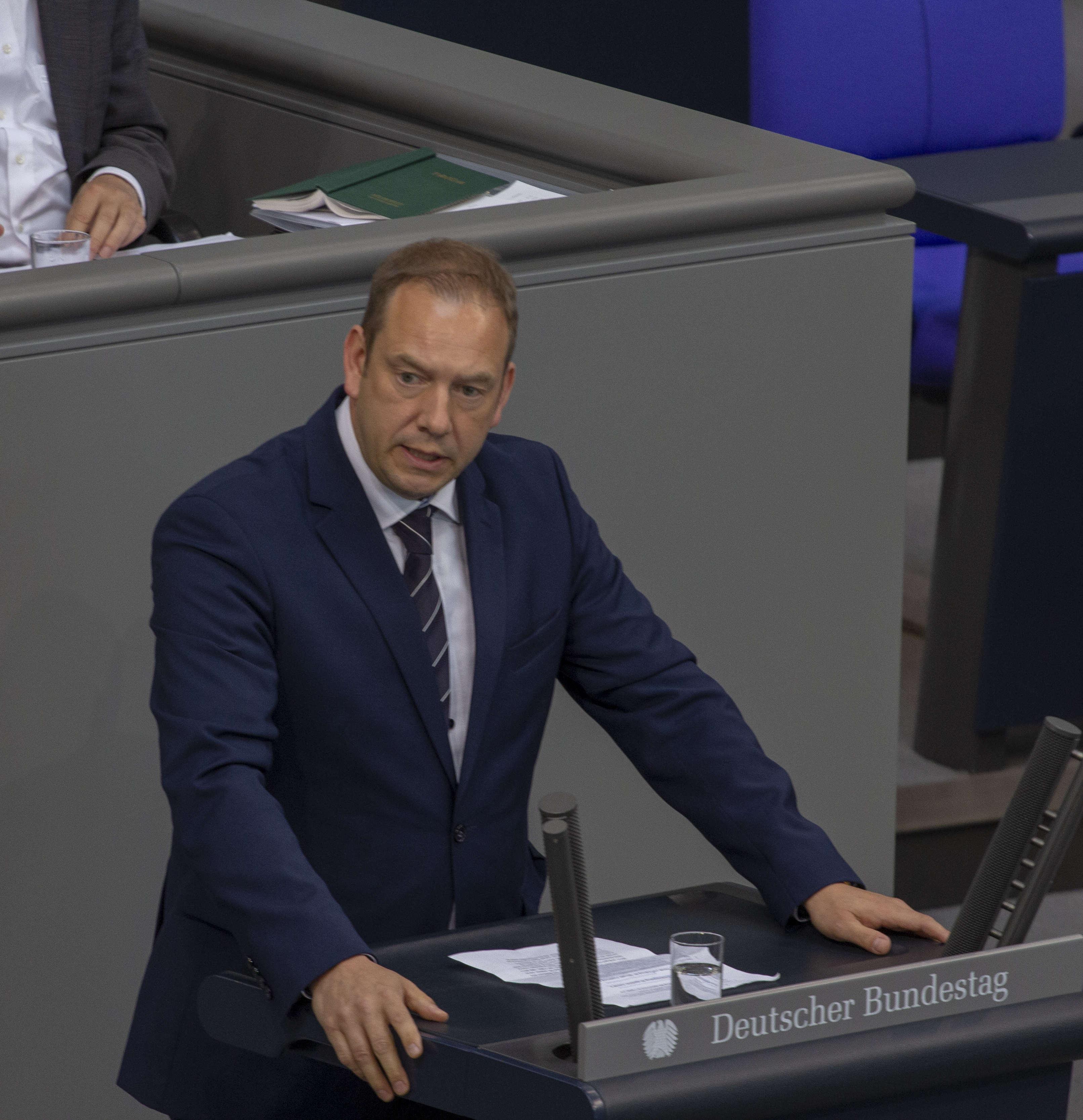 Henning Otte Mitglied des Deutschen Bundestages während einer Plenarsitzung am 9. Mai 2019 in Berlin.